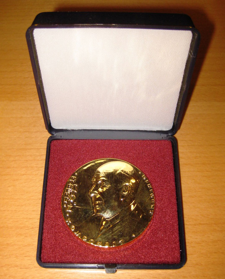 Die Robert Stolz Medaille ist ein Preis der vom Land Steiermark an steirische Blaskapellen für die dreimalige Teilnahme an Konzert- bzw. Marschwertung (2 x Konzert, 1 x Marsch oder 2 x Marsch, 1 x Konzert) innerhalb von 5 Jahren mit einer Gesamtpunktezahl von über 270 Punkten verliehen wird.